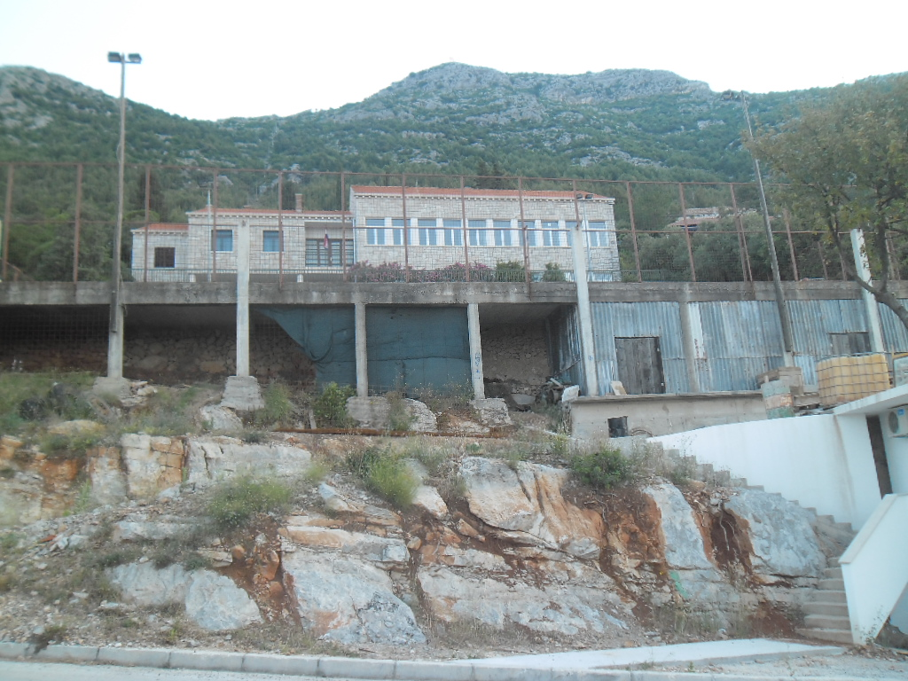 osnovna škola u Babinom Polju, Mljet